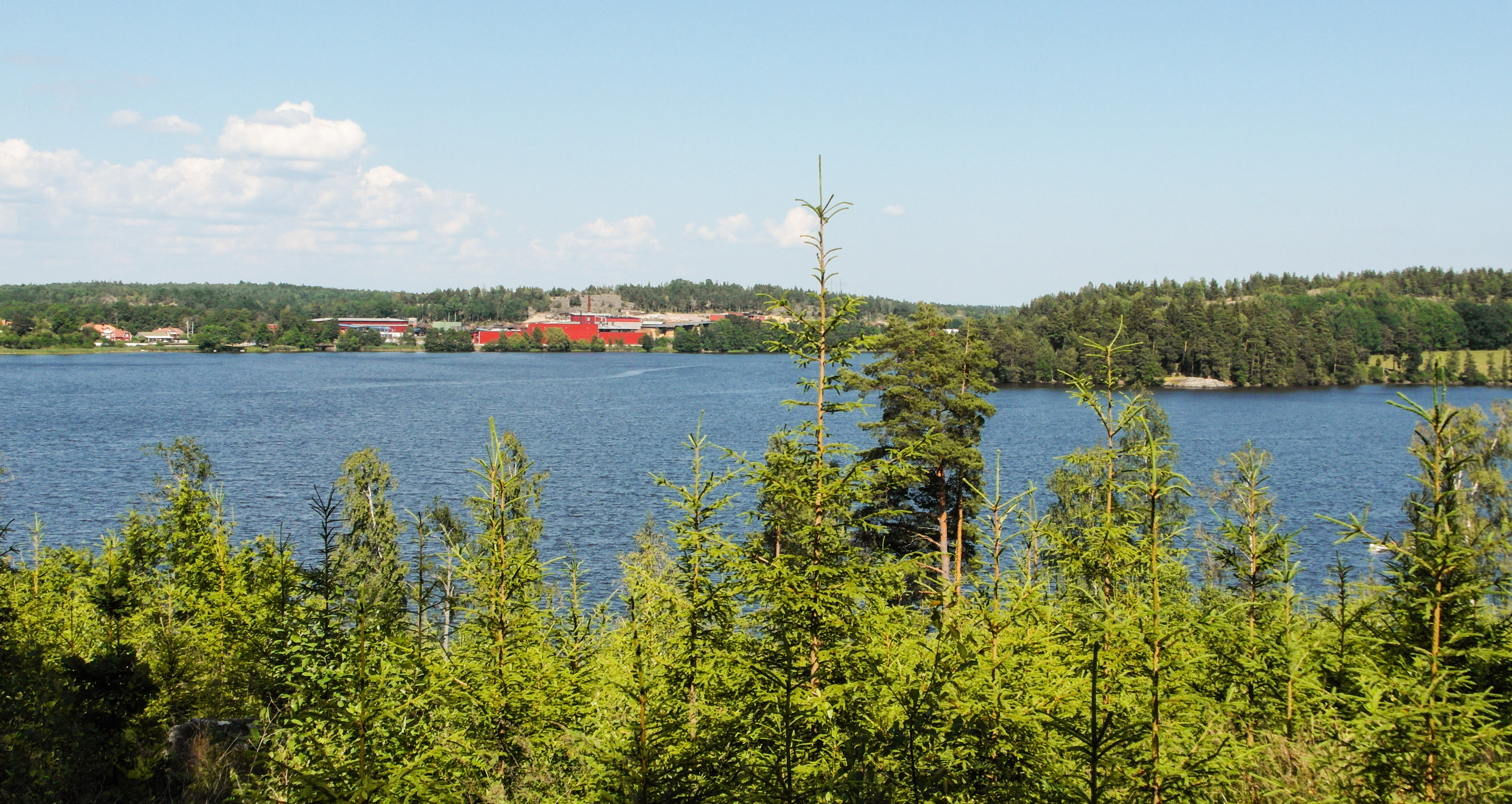 Visnaren, Åker, Strängnäs kommun, Södermanland, juli 2014. Vy mot Åkers styckebruk